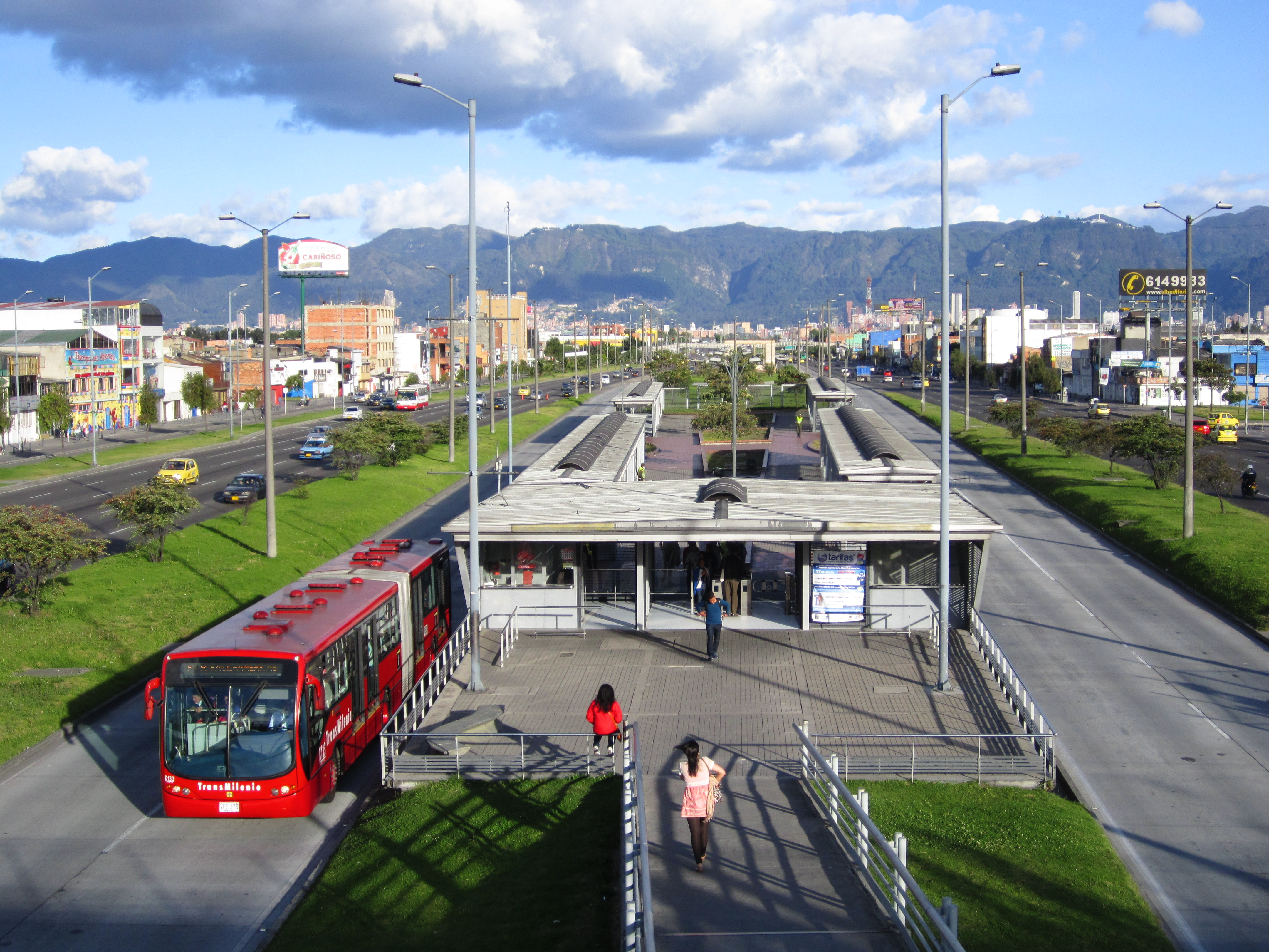 Estación Mundo Aventura del sistema Transmilenio en la avenida de las Américas con carrera 71 C. Localidad de Kennedy. Ciudad de Bogotá.